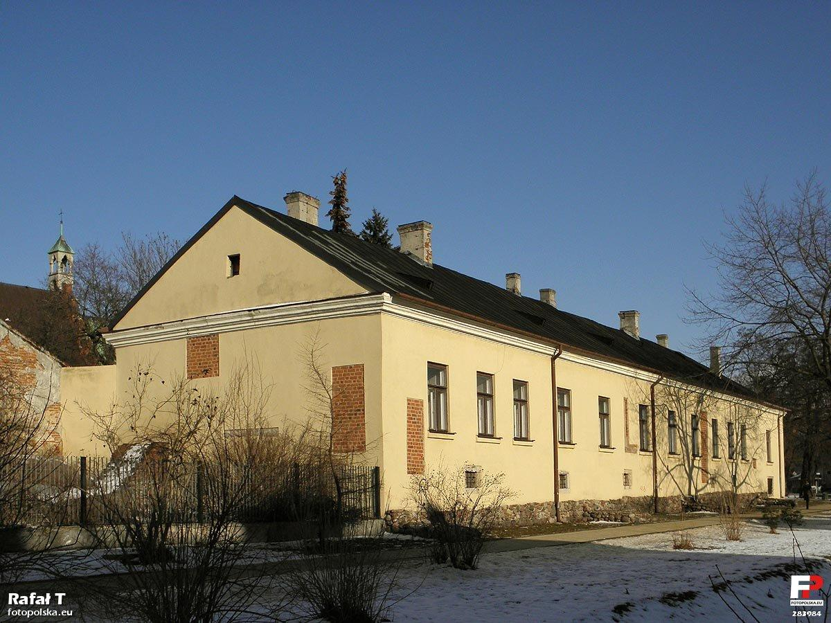 Pozostałość zamku Kazimierzowskiego z XIV w.